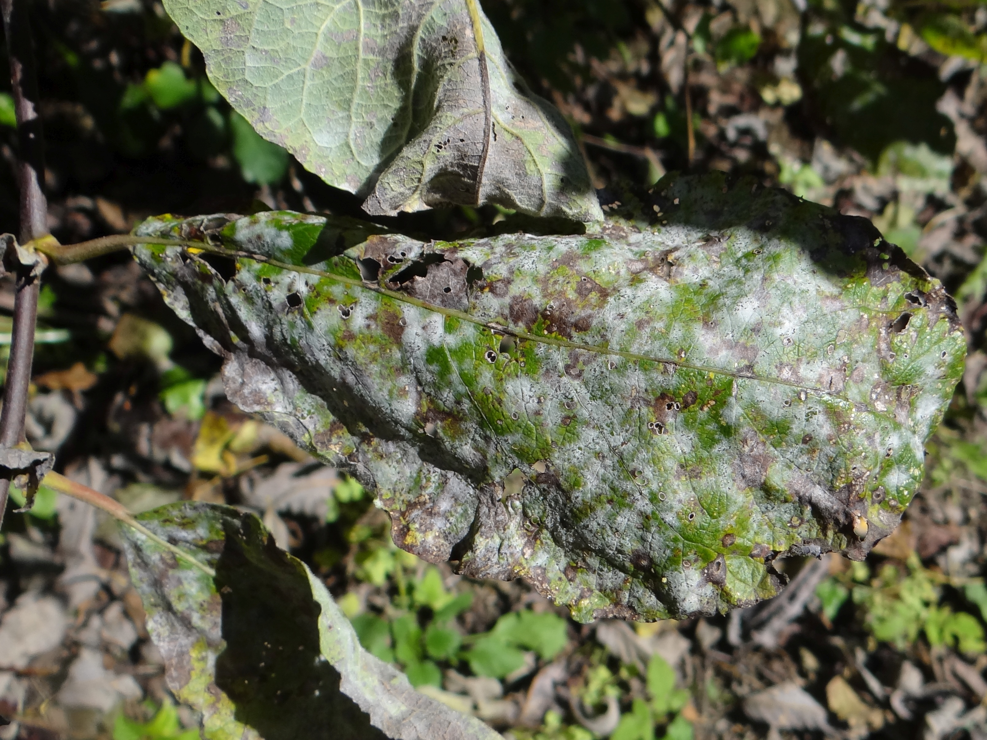 'Erysiphe adunca on Salix caprea